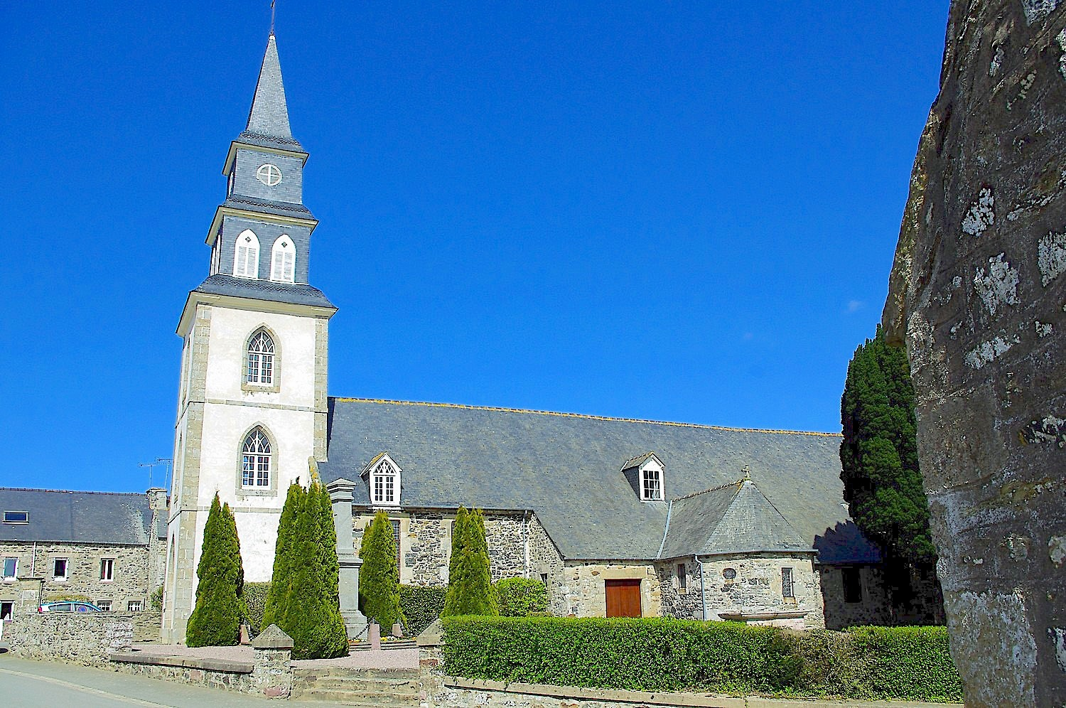 L'église de Pléboulle, dans les Côtes d'Armor, en 2012.